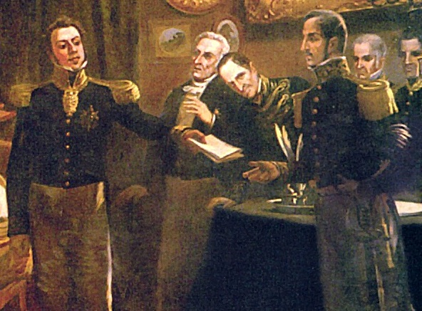 Extrato do quadro que retrata a Abdicação de D. Pedro I